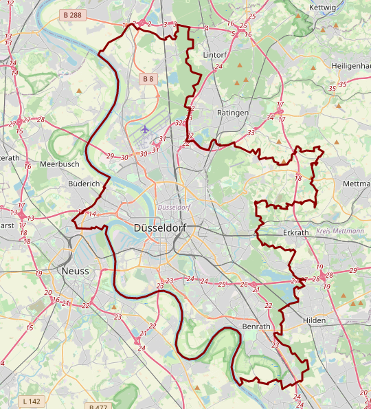 carte réalisée sur umap This map may be incomplete, and may contain errors. Don't rely solely on it for navigation.